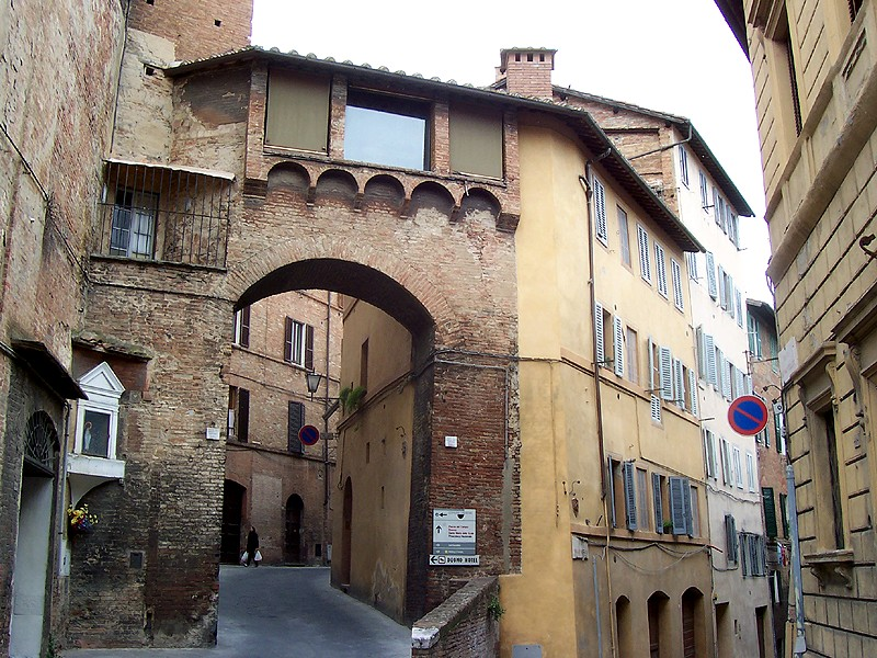 Siena - Arco di Via Sarrocchi